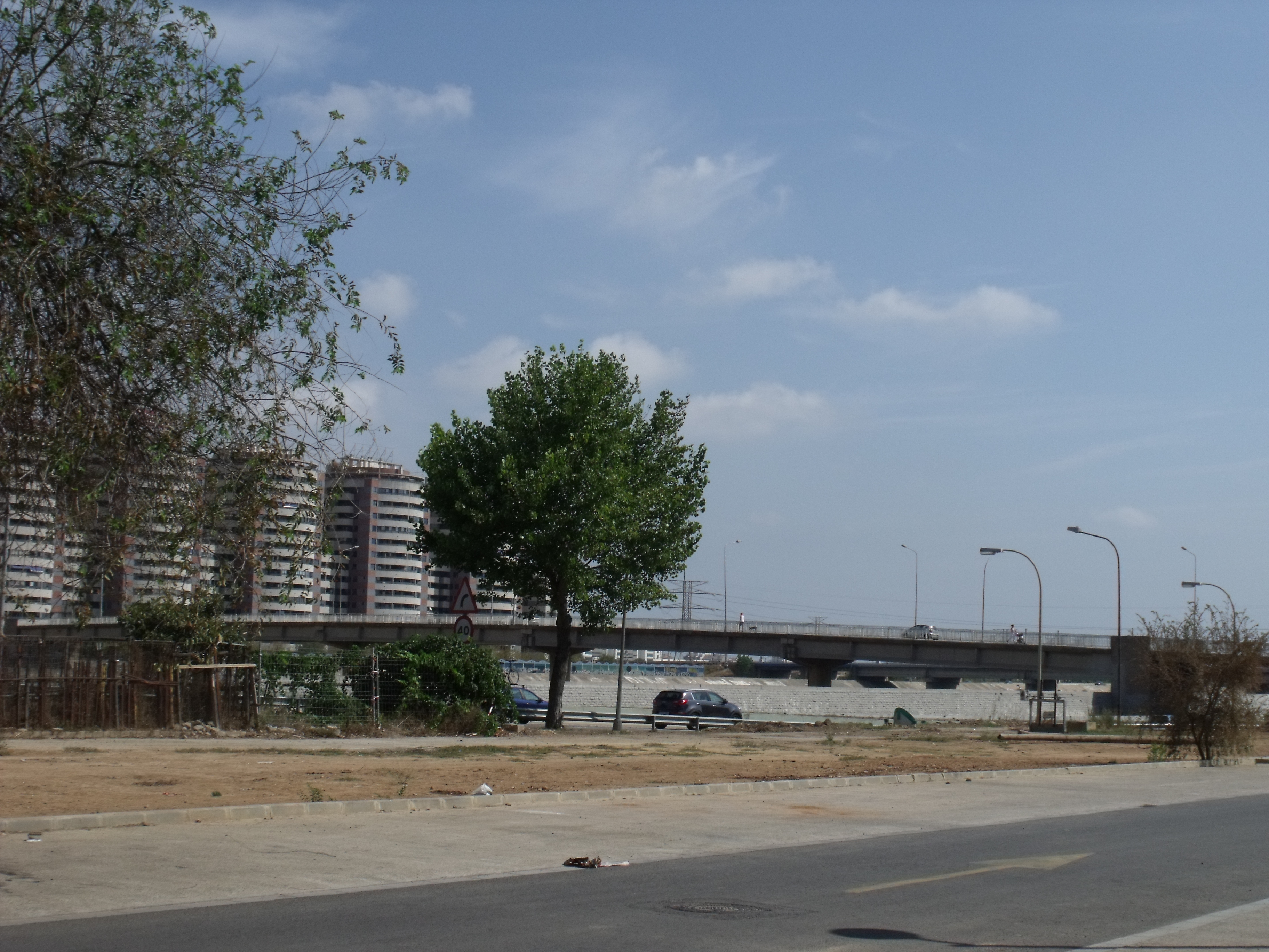 Puente que una las dos partes del barrio de La Torre. Pasa sobre el nuevo cauce del Turia y los dos trazados de la V-30.